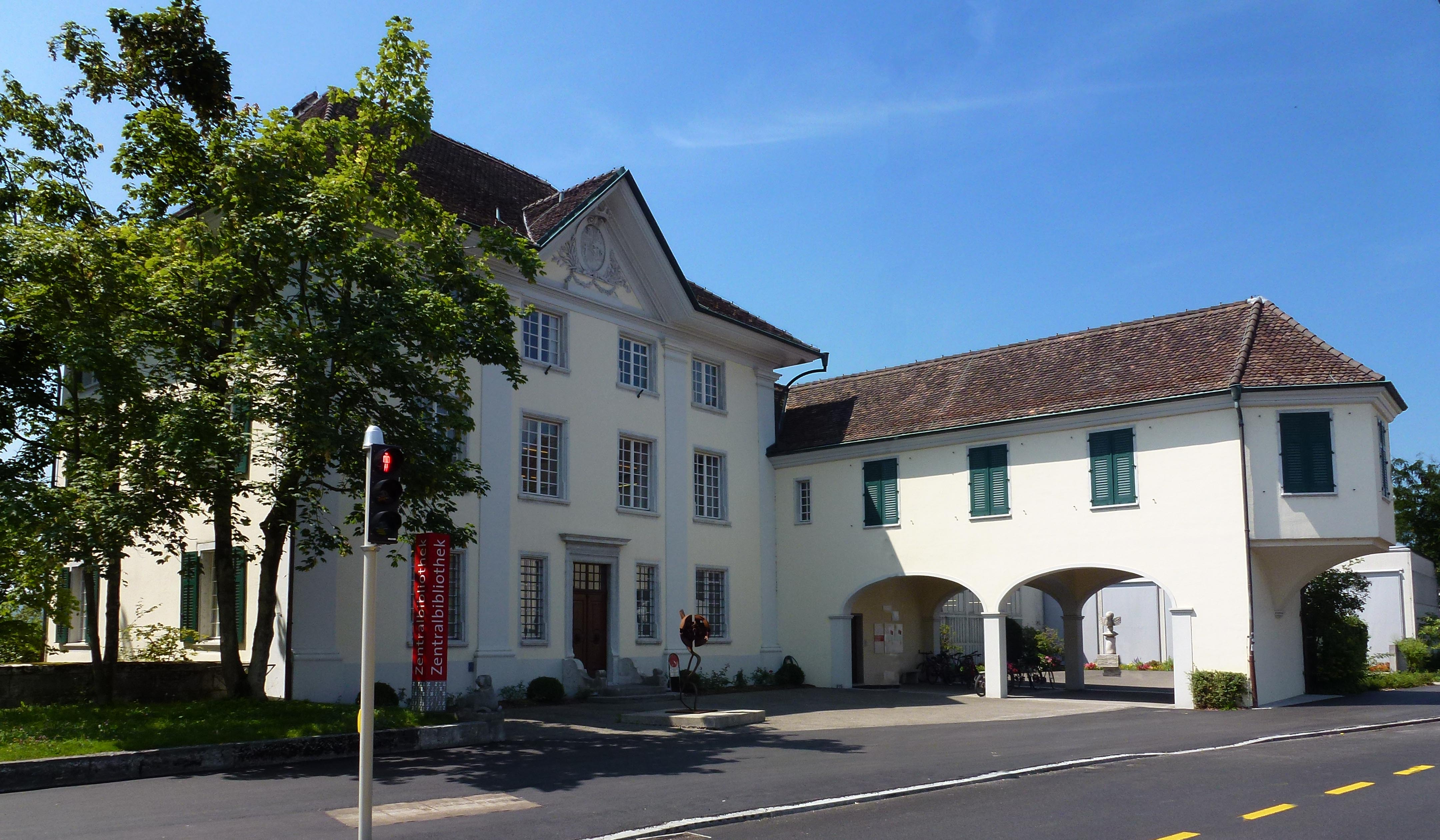 Das Hauptgebäude der Zentralbibliothek in Solothurn (Sommerhaus "von Roll".